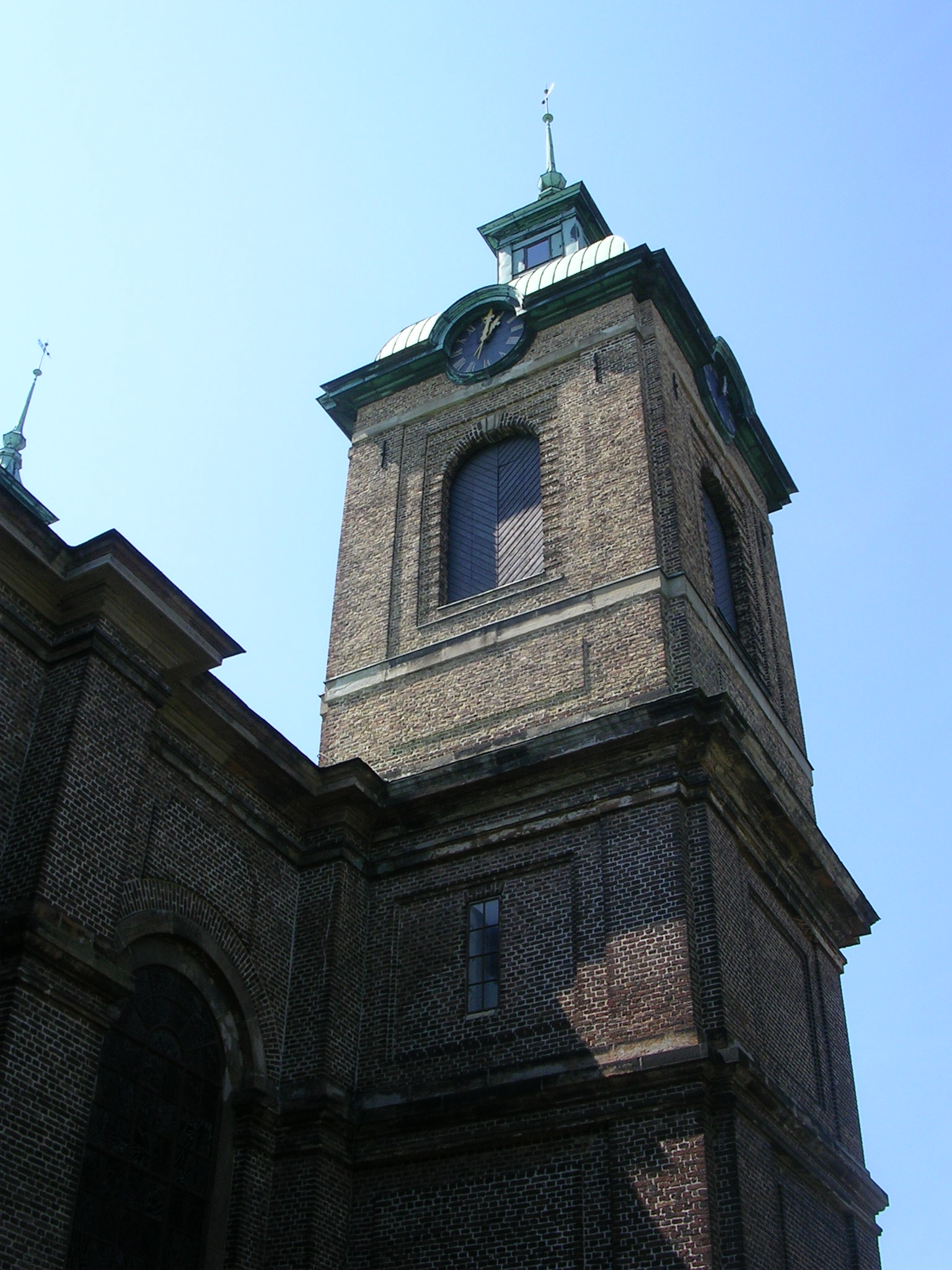 Sofia Albertina kyrka in Landskrona Author: Väsk Date: July 2005